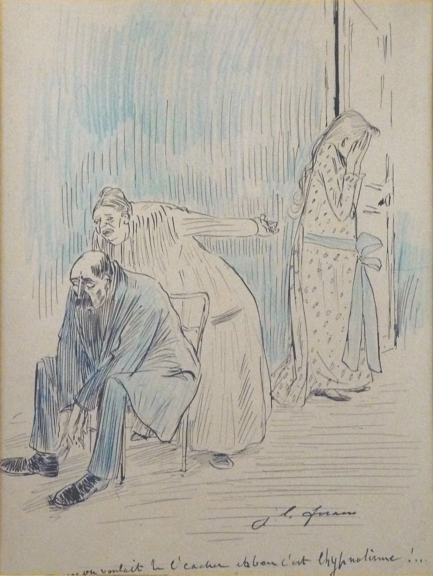 Forain J.L. - Ink, blue pencil - "On voulait te l’cacher eh ben c’est l’hypnotisme !..." - 27.5x23.5cm; le dessin porte la légende suivante : « On voulait te l’cacher… eh ben c’est l’hypnotisme !... ». Il a été publié dans l’ouvrage « La comédie parisienne », un recueil de 250 dessins de l’artiste, paru en 1892.